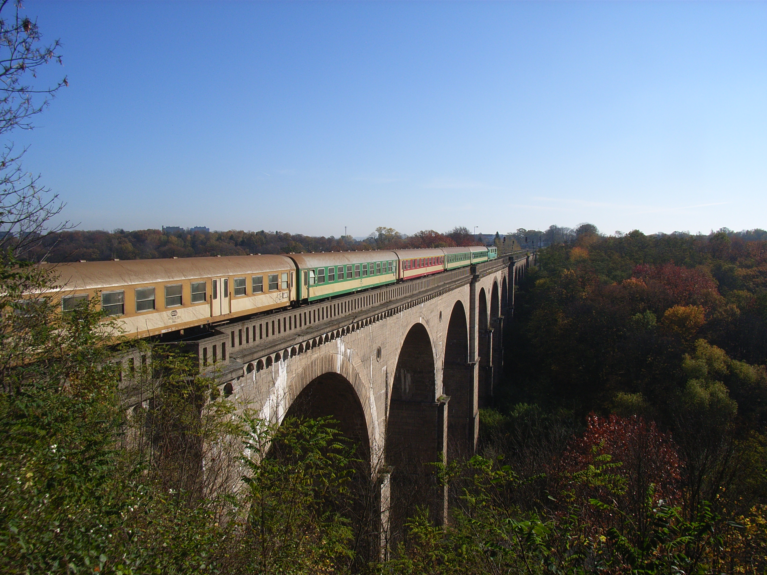 Neißeviadukt, Görlitz mit Zug der PKP